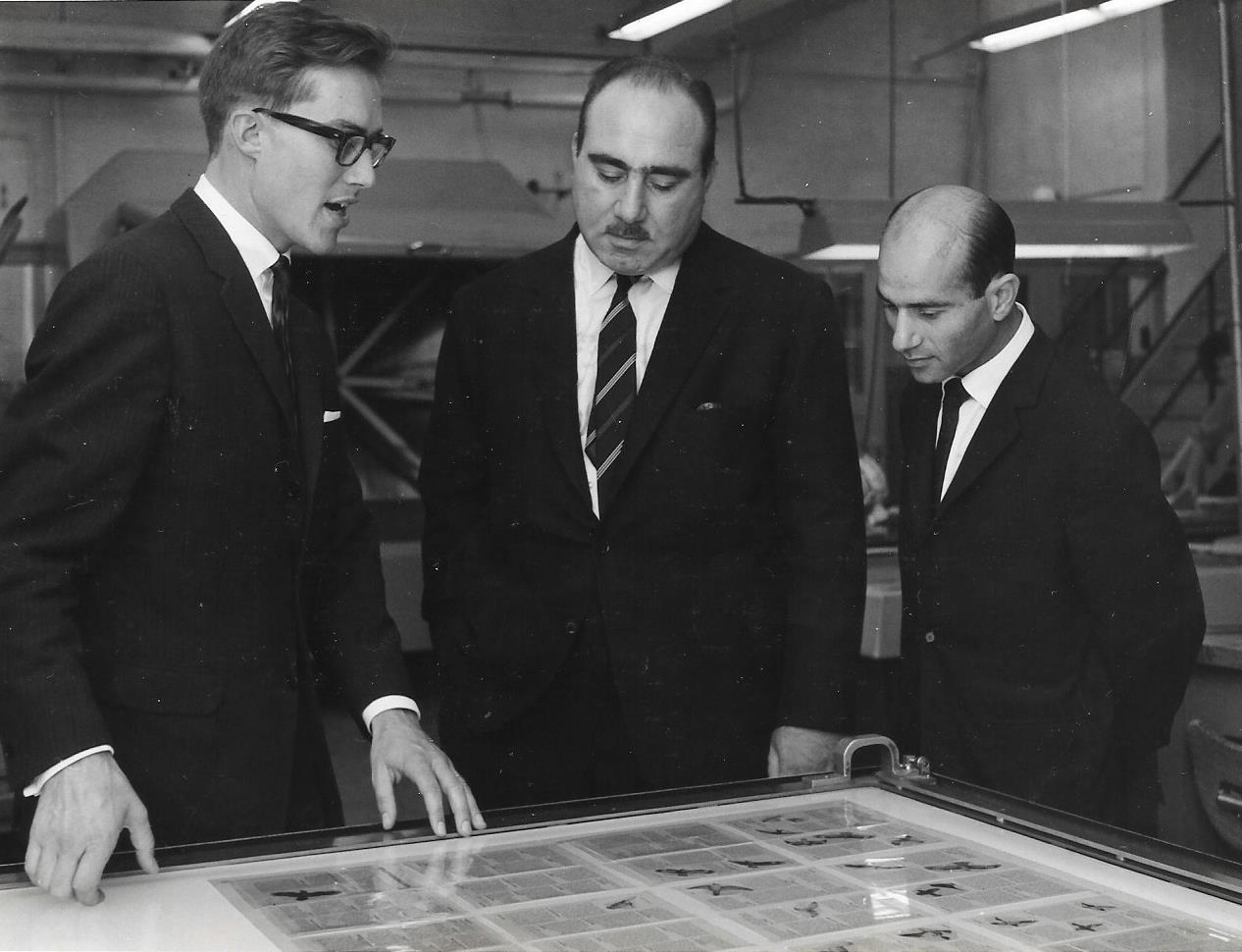 פגישת עסקים עם נכבד מצרי ואירופי